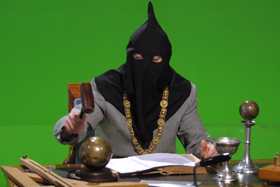 Massone - Personaggio di Corrado Guzzanti